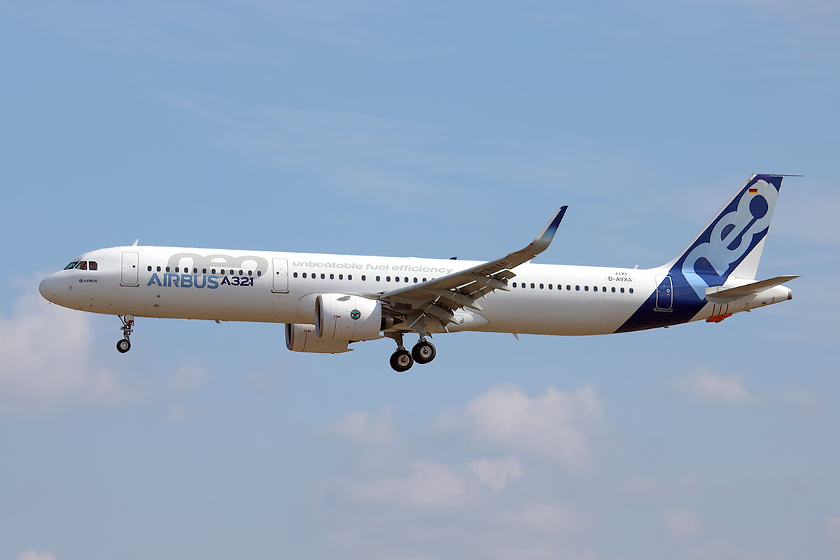 Reg: D-AVXA Aircraft: Airbus A321-271N Airline: Airbus Industrie Serial #: 6673 at Toulouse Blagnac - LFBO